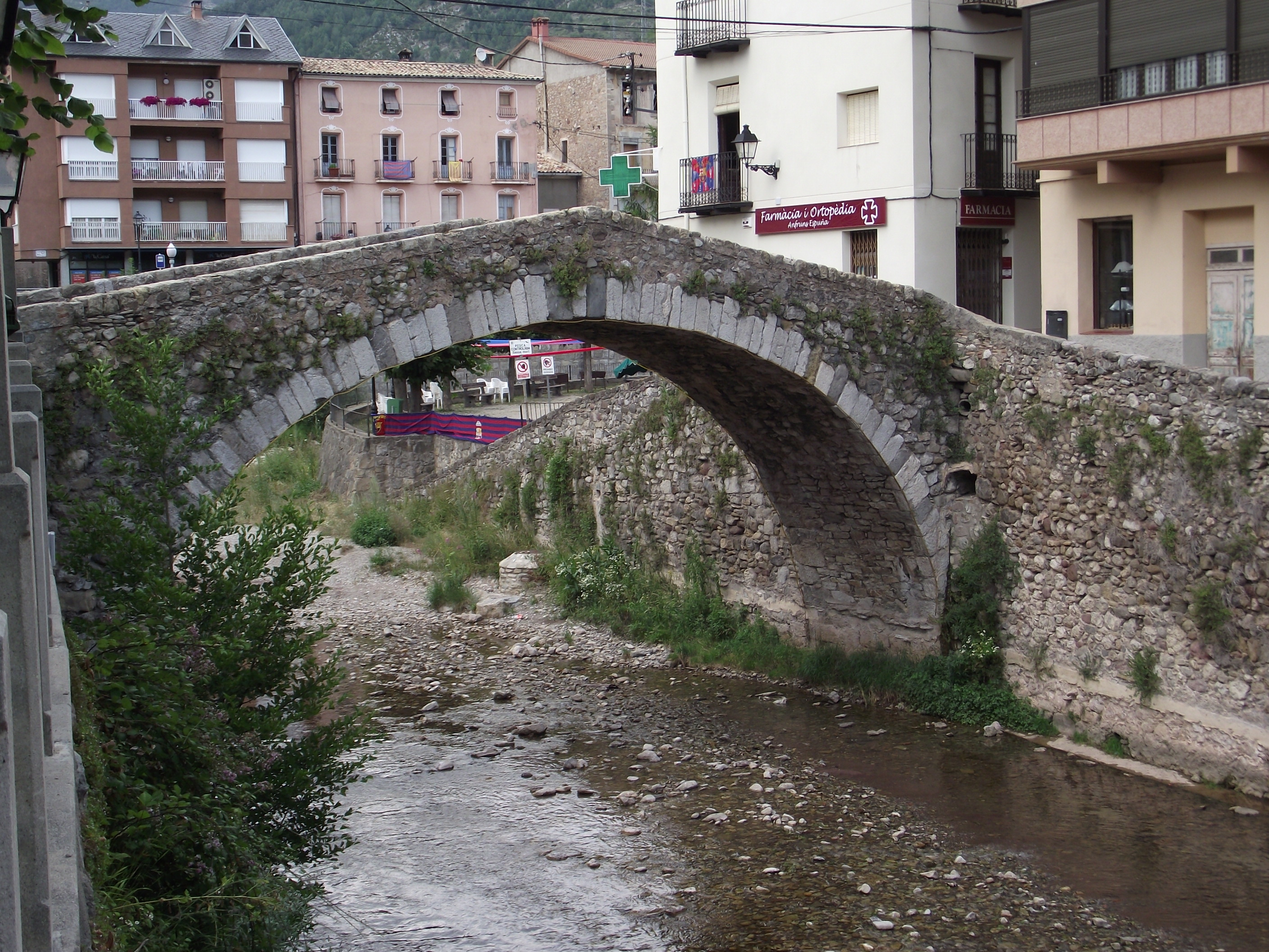 Pont de la Petita (la Pobla de Lillet)